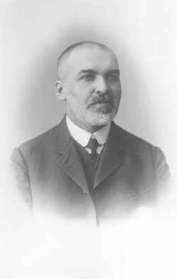 Jevgeni Vjatšeslavovitš Petuhhov